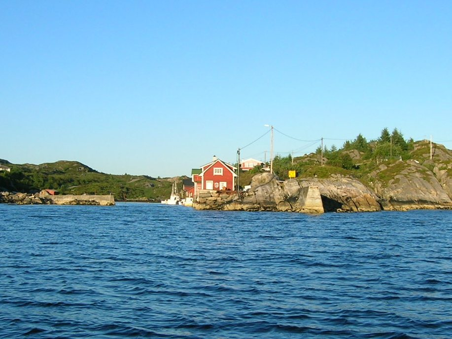 Byrknesøy in Gulen, Norway. Picture taken 2006-07-18 by Gunnar Buvik